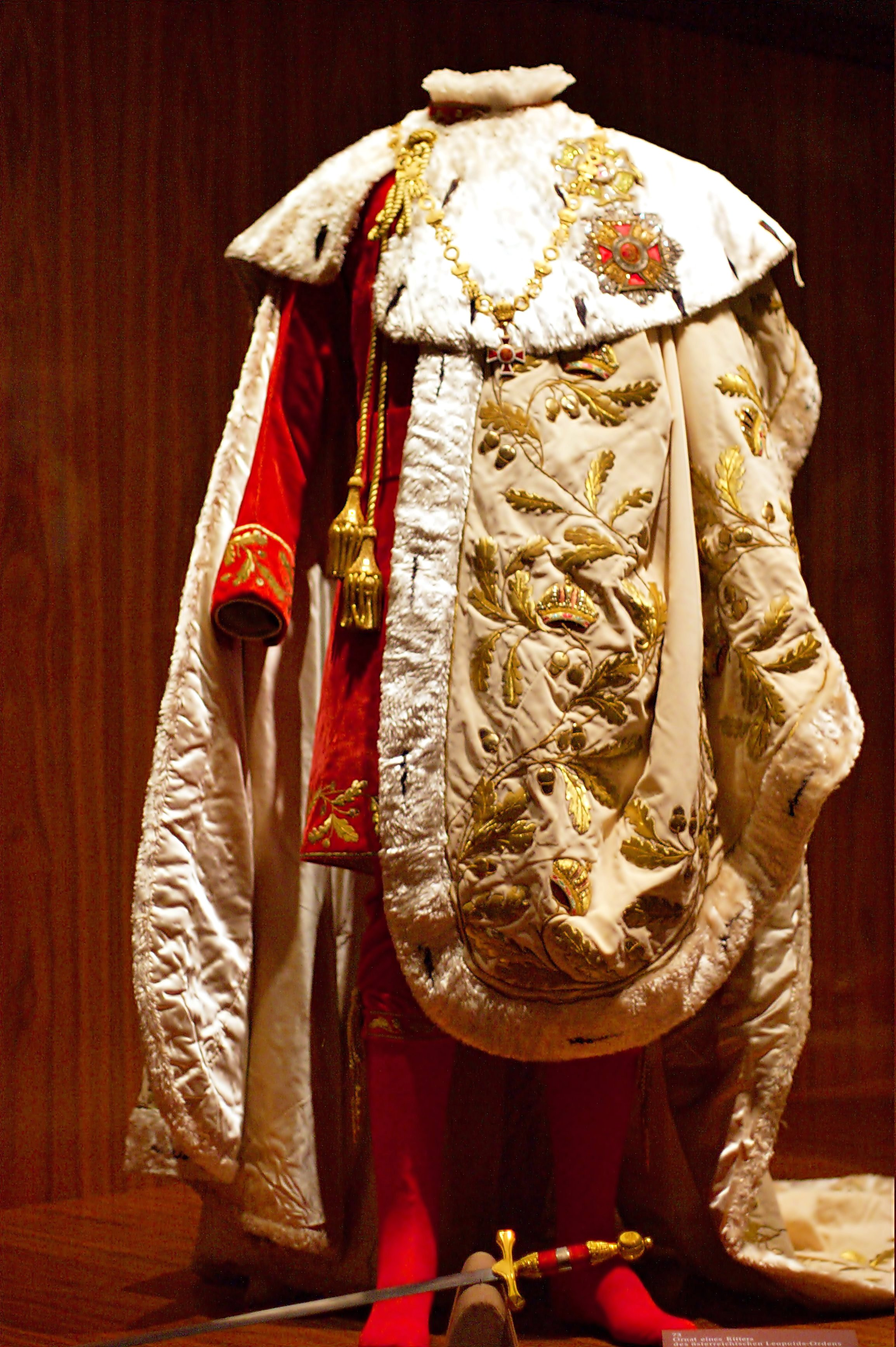 Ornat des Leopoldsordens 1808. Ausgestellt in der Schatzkammer Wien